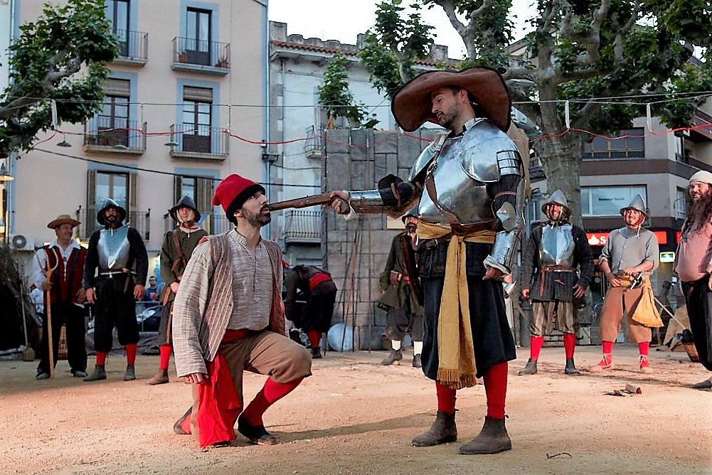 Recreació històrica de l'arribada de l'algutzir Miquel Joan de Mont-rodon a Sta. Coloma de Farners. En aquesta imatge veiem l'actor que interpreta l'algutzir amenaçant al jove que protesta per la imposició, sota amenaça dels allotjaments. Festa de la Revolta dels Segadors 2017, Santa Coloma de Farners